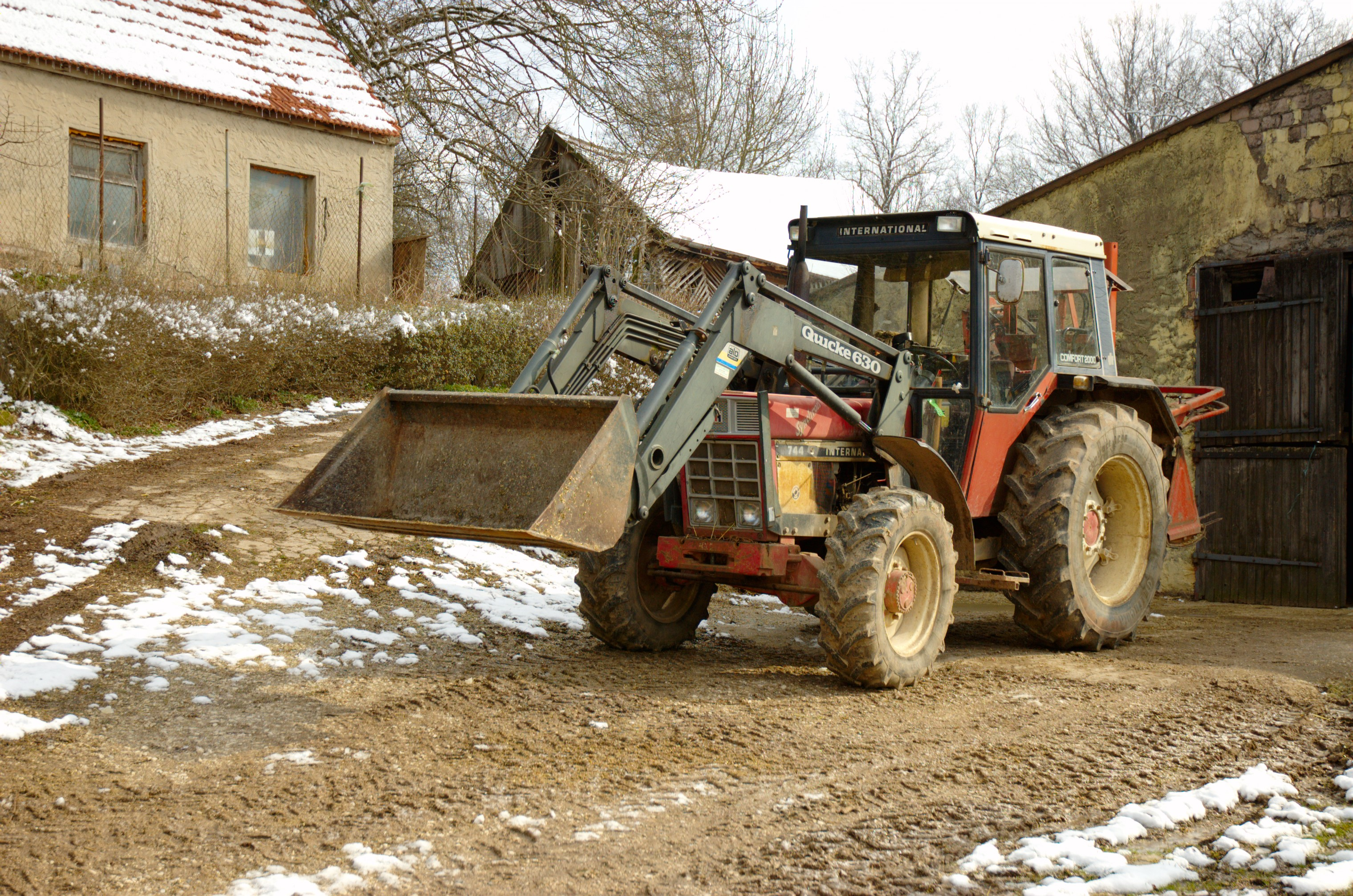 Traktor International Harvester 744 (Kabine Comfort 2000) mit Quicke-Frontlader